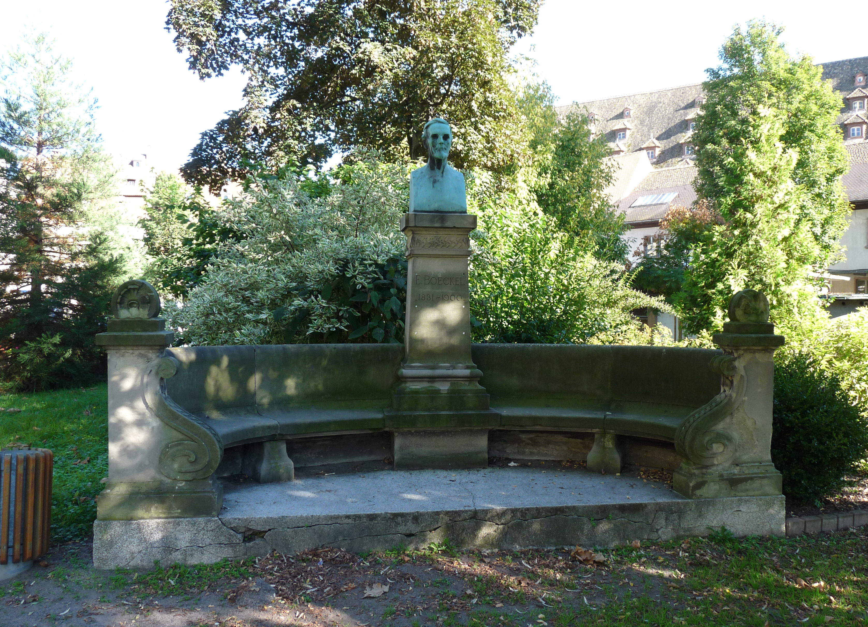 Buste du chirurgien Eugène Boeckel réalisé par Alfred Marzolff. Monument situé dans l'enceinte de l'Hôpital Civil de Strasbourg, derrière l'ancienne pharmacie.